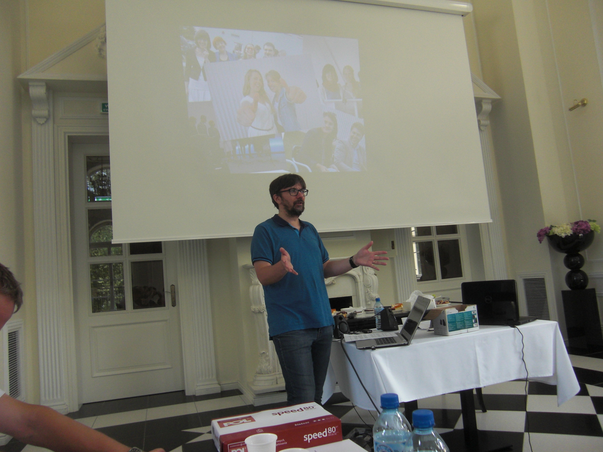 Spotkanie merytoryczne kadry WSTS